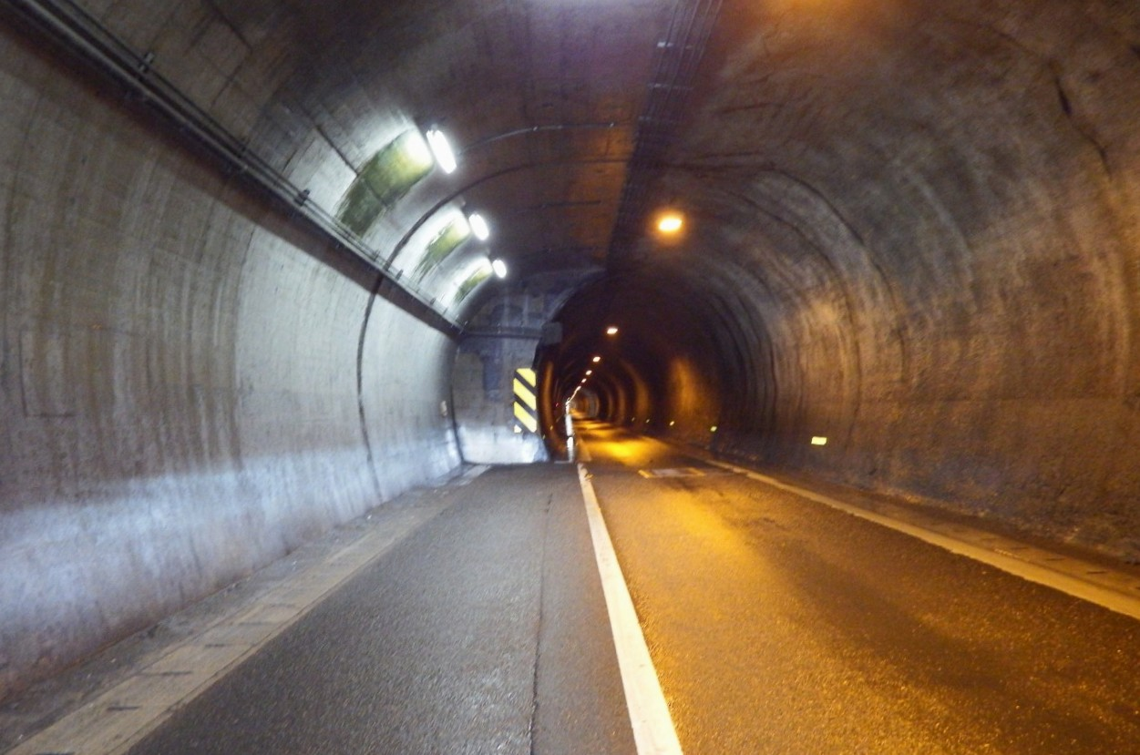 法皇トンネルの退避所